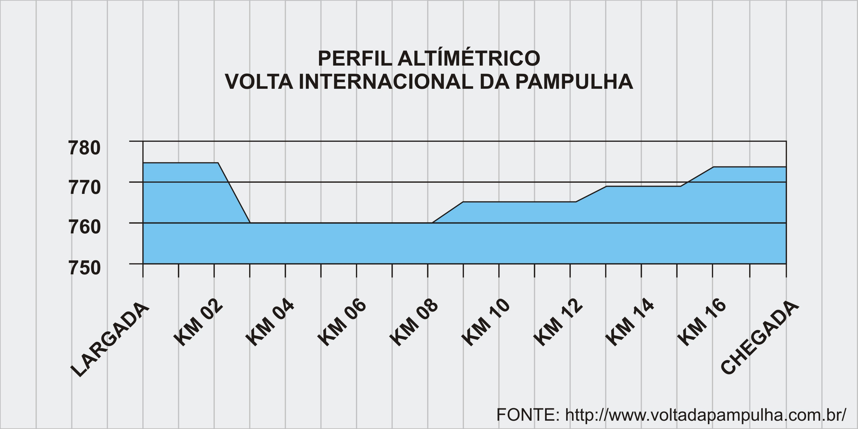 Reprodução do perfil altimétrico da Volta Internacional da Pampulha de acordo com informações obtidas no site oficial do evento.